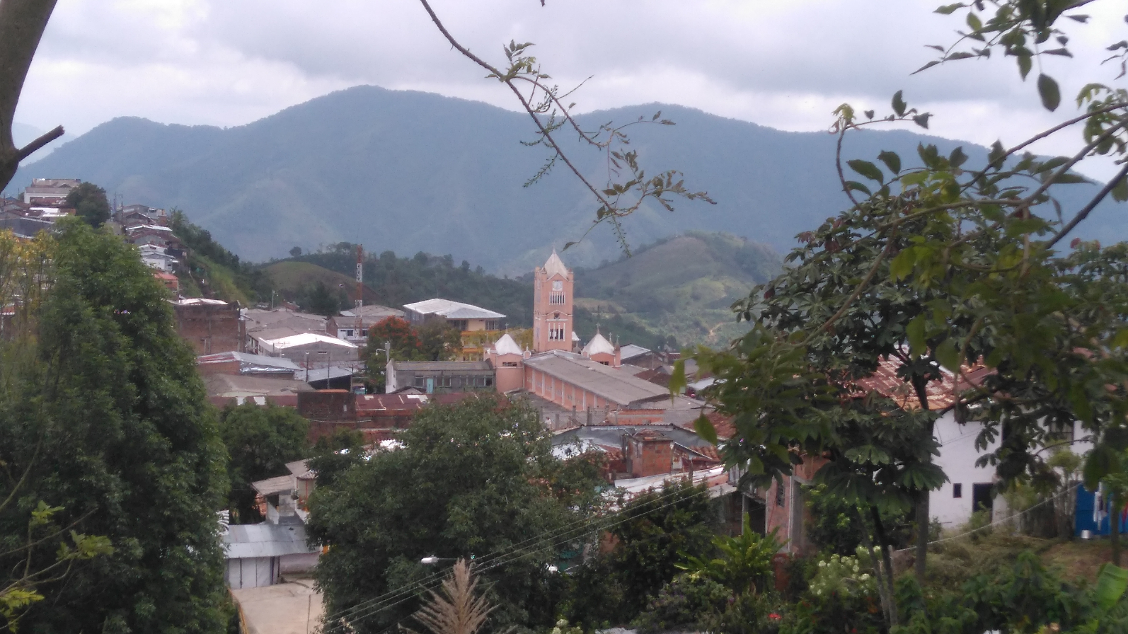 Vista de El Águila, desde el Polideportivo Municipal. El Águila, Valle del Cauca, Colombia.